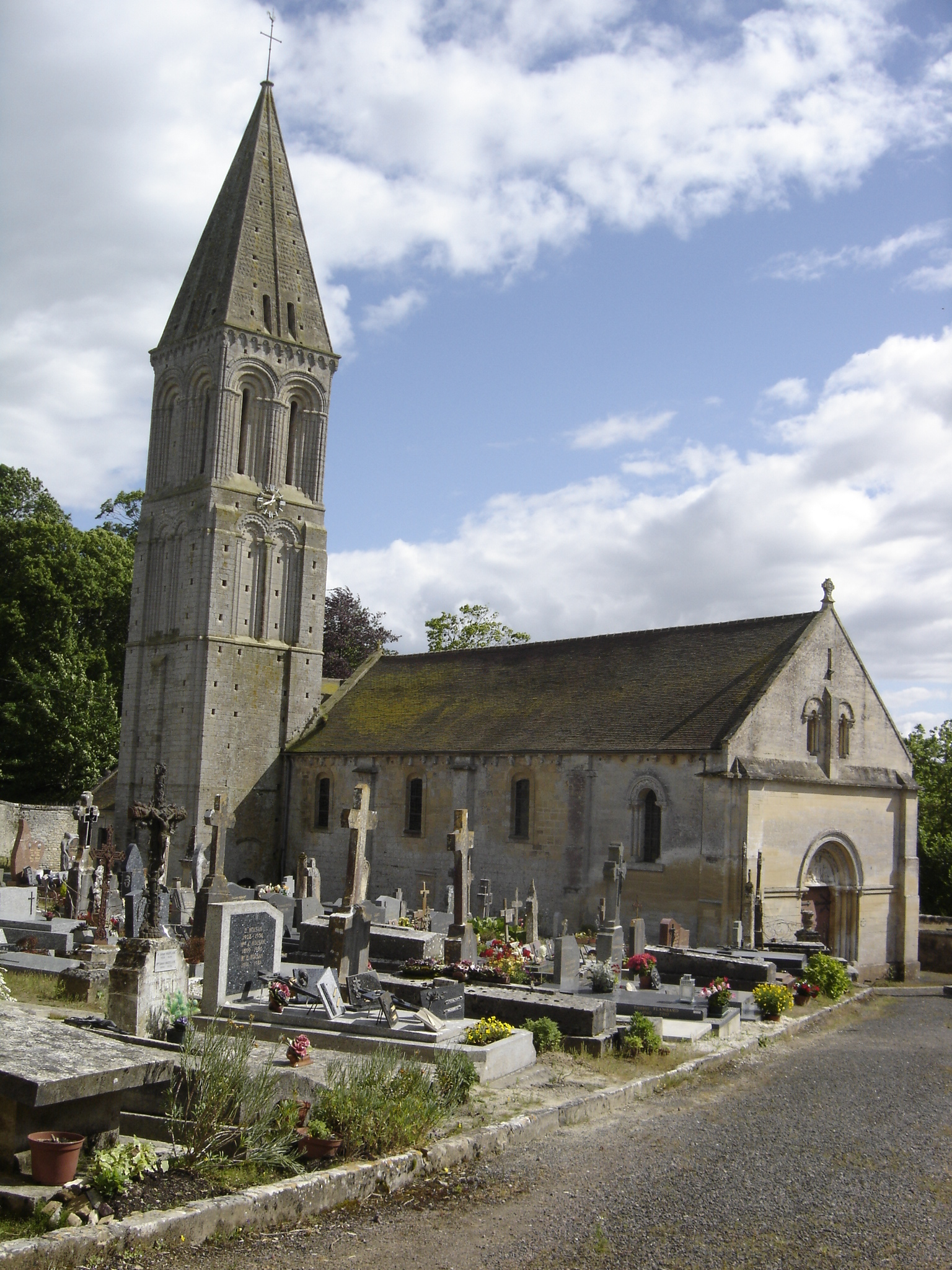 l'église est en contre-bas par rapport au cimetière qui l'entoure et par rapport à la majeure partie du village